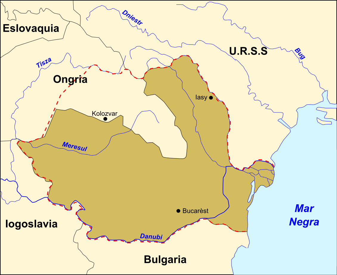 Romania en 1940.